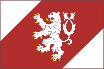 Lišov